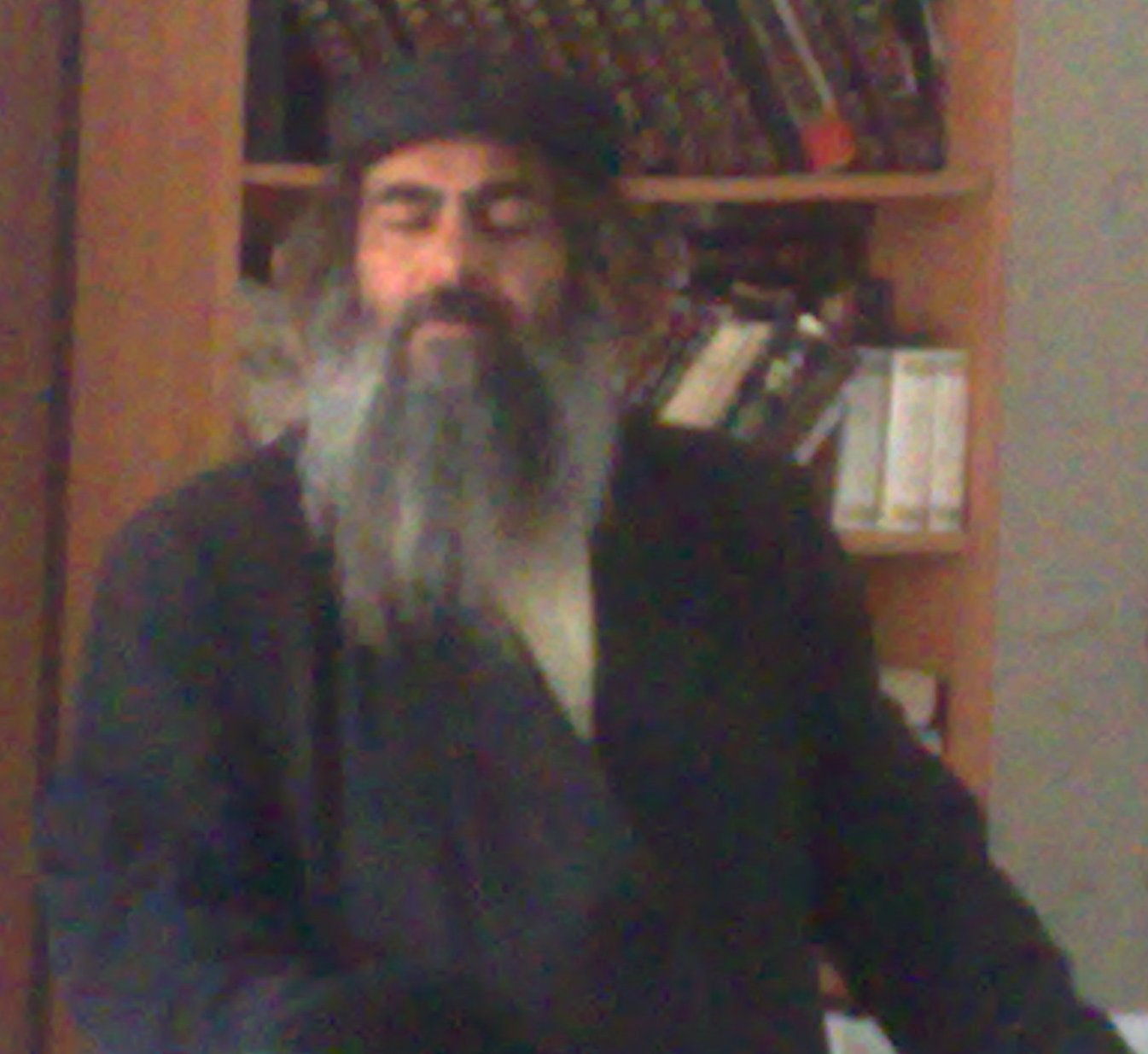 הרב שלום סבג